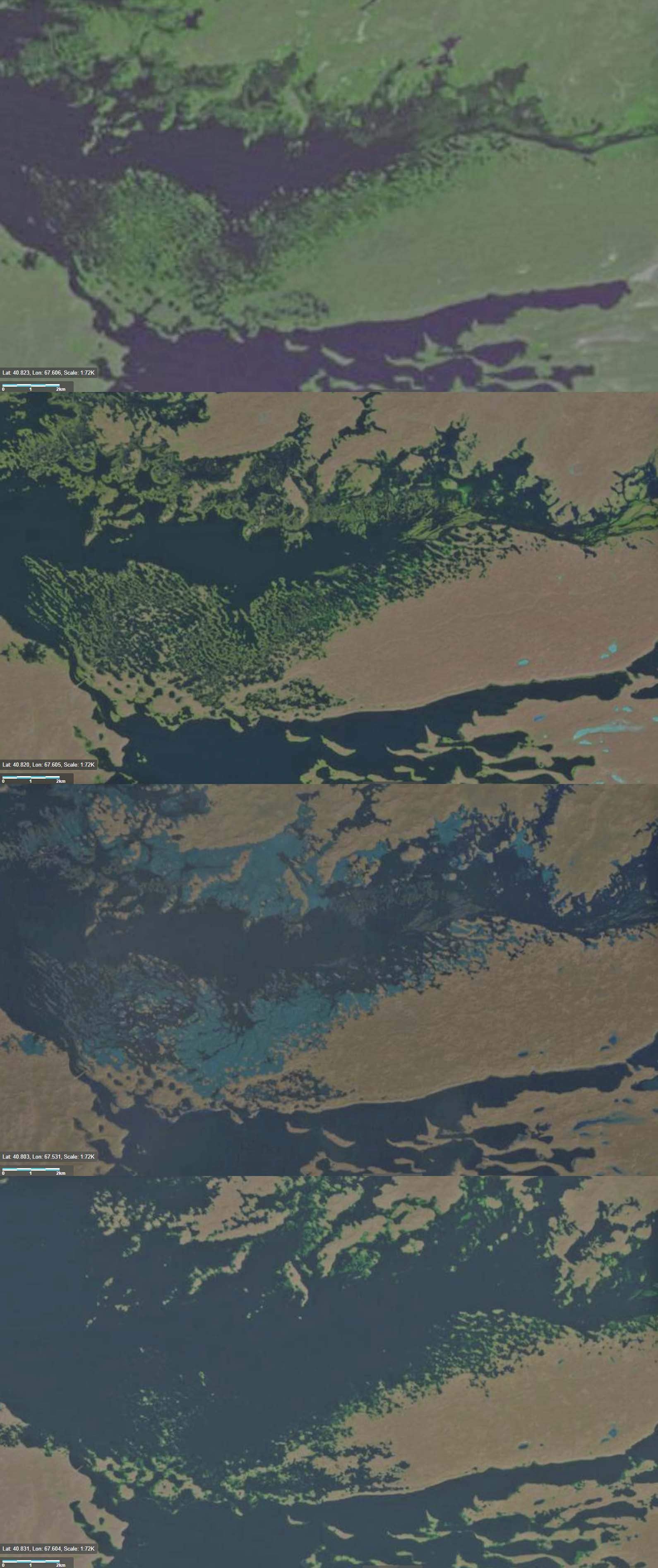 Seespiegel: 1.10.1969 (239,4 m) 26.9.1993 (238,8 m) 1.2.1994 (ca. 241 m) 29.9.1994 (241,6 m)